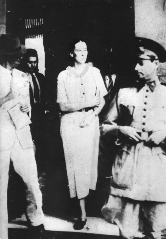 ADN-ZB/IML-ZPA, 19.2.1975 Olga Benario-Prestes Antifaschistin geb. 12.2.1908 München April 1942 in Bernburg ermordet, emigrierte 1933 in die Sowjetunion; 1935 folgte sie dem brasilianischen KP-Führer Luis Carlos Prestes in dessen Heimat. Von Brasilien wurde sie im Frühjahr 1936 an die Gestapo ausgeliefert. Im November 1936 gebar sie im Berliner Frauengefängnis eine Tochter, die auf Grund internationaler Proteste an die Mutter von L.C. Prestes übergeben werden mußte. Olga Benario-Prestes wurde in das KZ-Ravensbrück verschleppt und in Bernburg vergast. Während ihrer Verhaftung in Brasilien